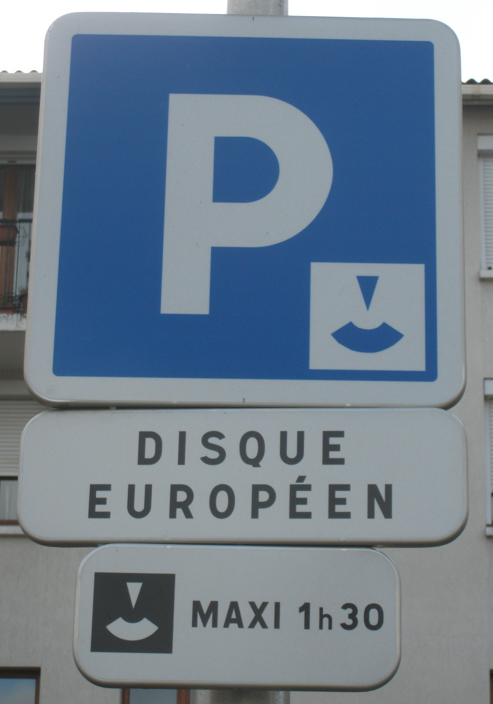 Panneau routier d'indication d'un lieu aménagé pour le stationnement gratuit à durée limitée avec contrôle par disque en France, panonceau M9z (disque européen) et panonceau M6c limitant la durée du stationnement à 1h30.Mise en place du nouveau disque de stationnement sur les parkings de la place des Ramacles, à Aubière (63).Panneaux implantés sur support de l'éclairage public - Girod 2011